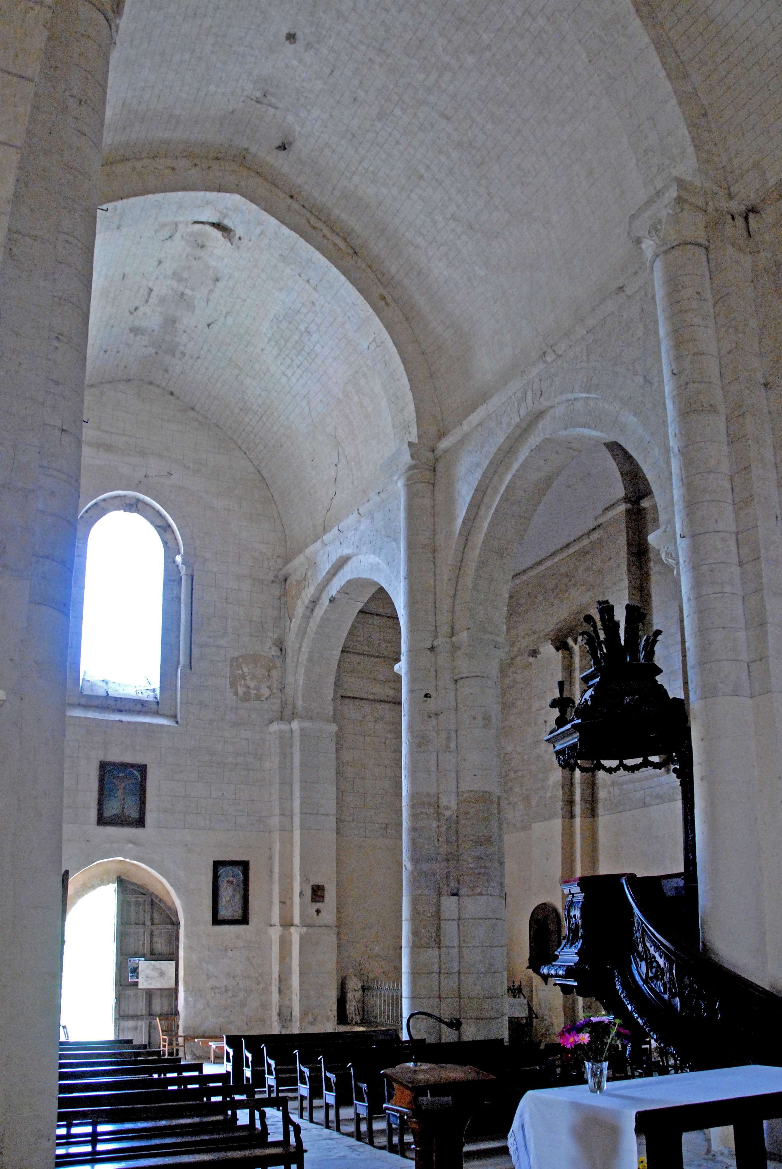 Château-Larcher, hinteres Mittelschiff